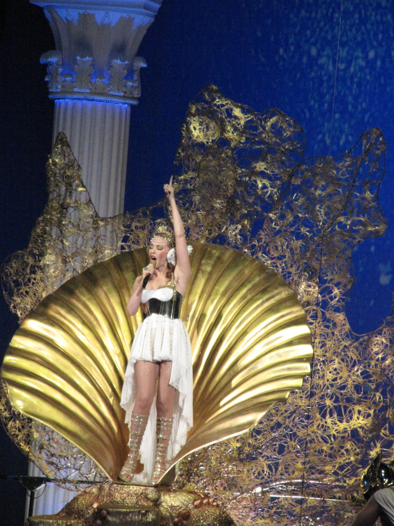 Kylie Minogue interpretando «Aphrodite» al inicio del concierto de Aphrodite Les Folies Tour